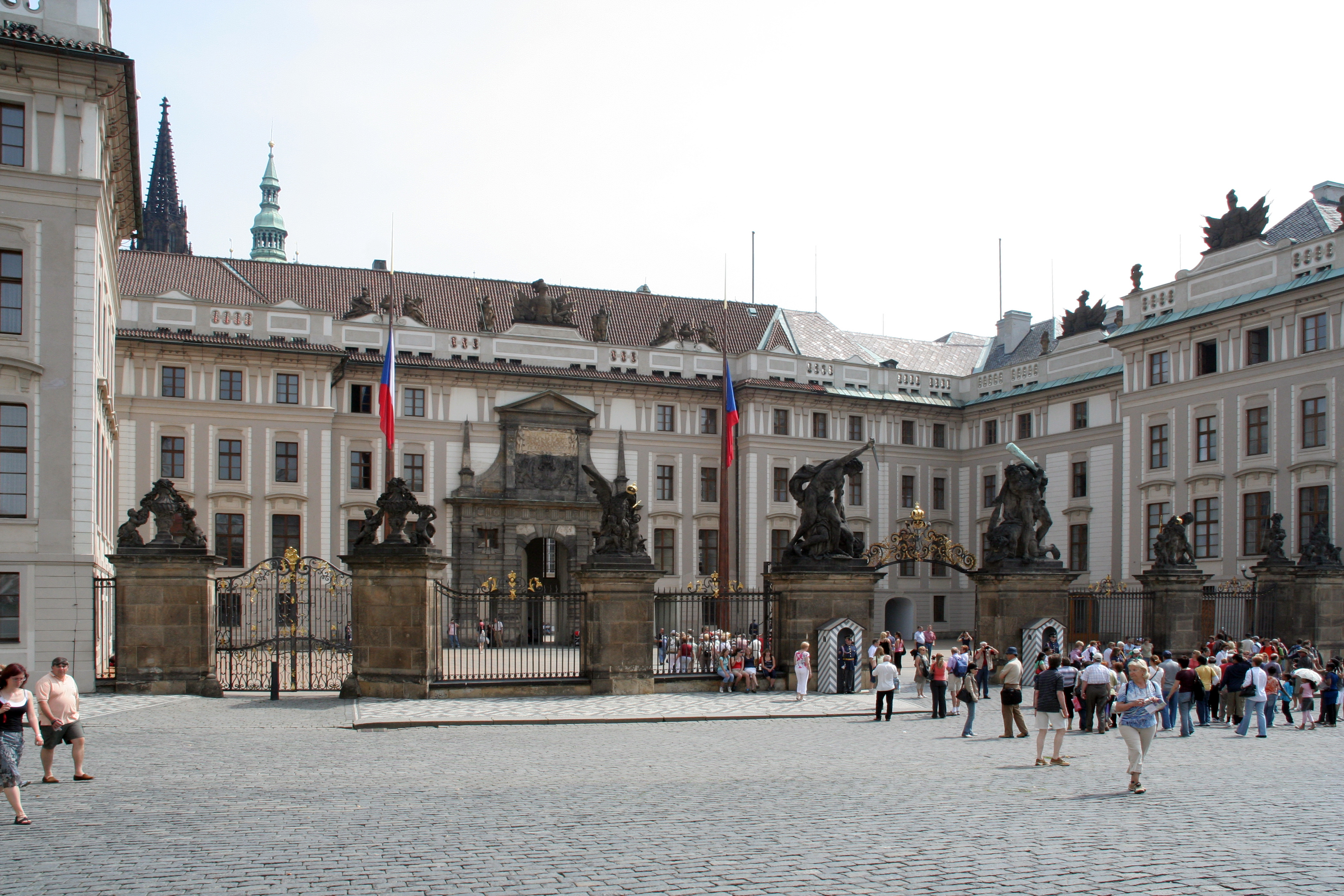 Pražský hrad, 1. nádvoří